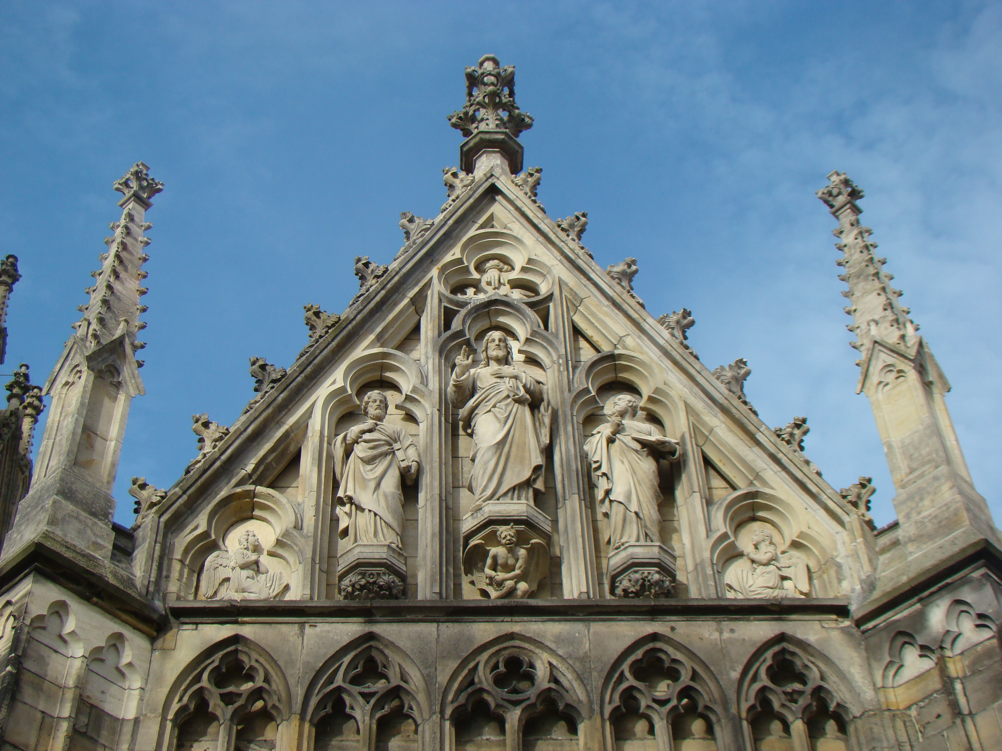 St. Marien, Stadtilm, Giebel mit Skulpturen von Ernst Wilhelm Paul